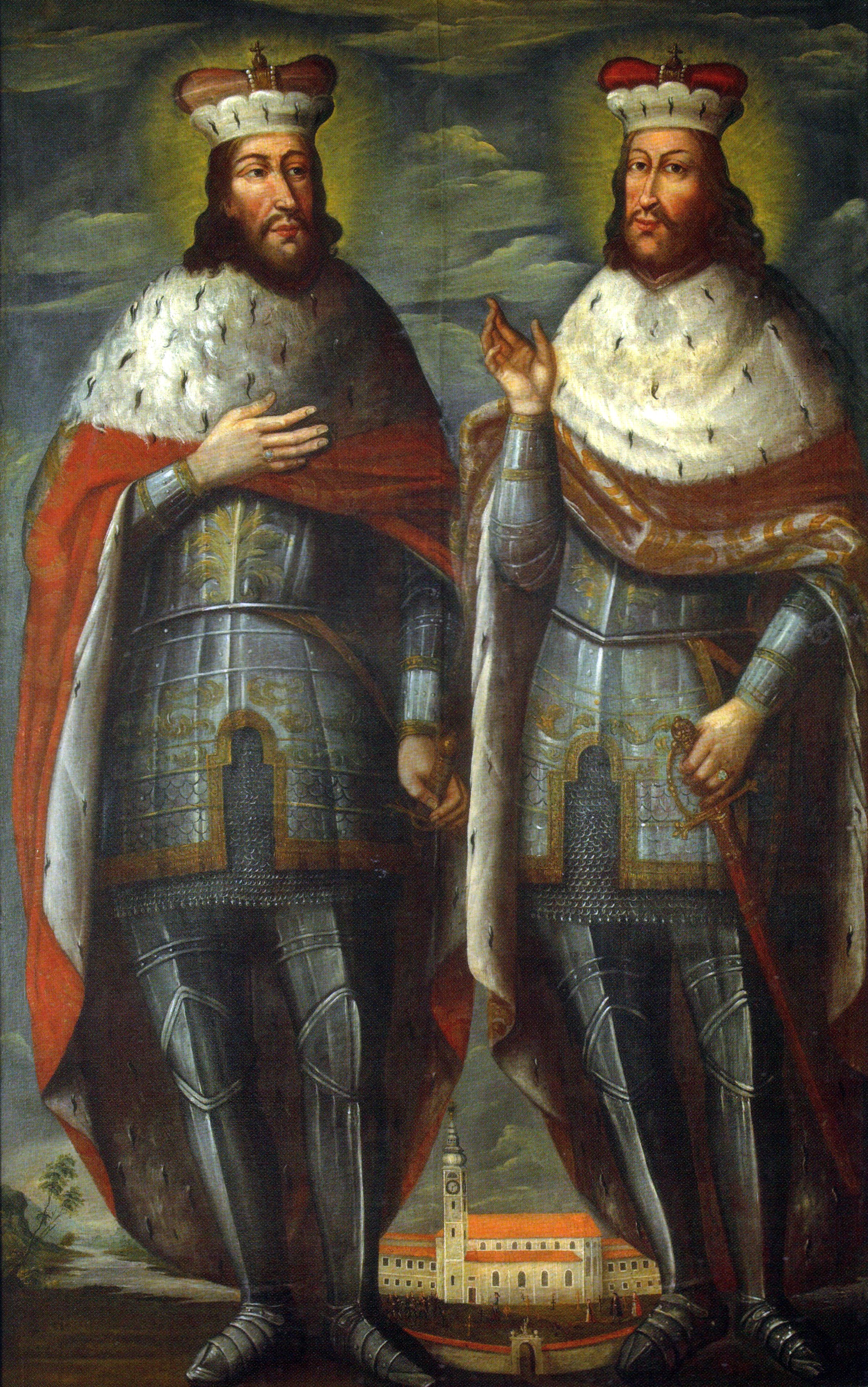 Adalbert und Otakar